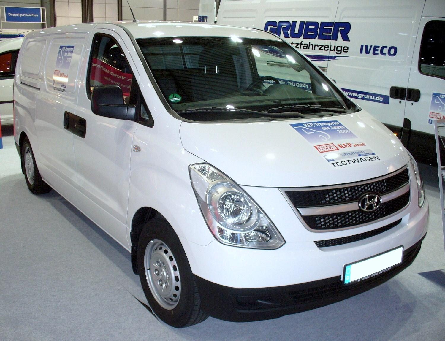 Hyundai H-1 Bus